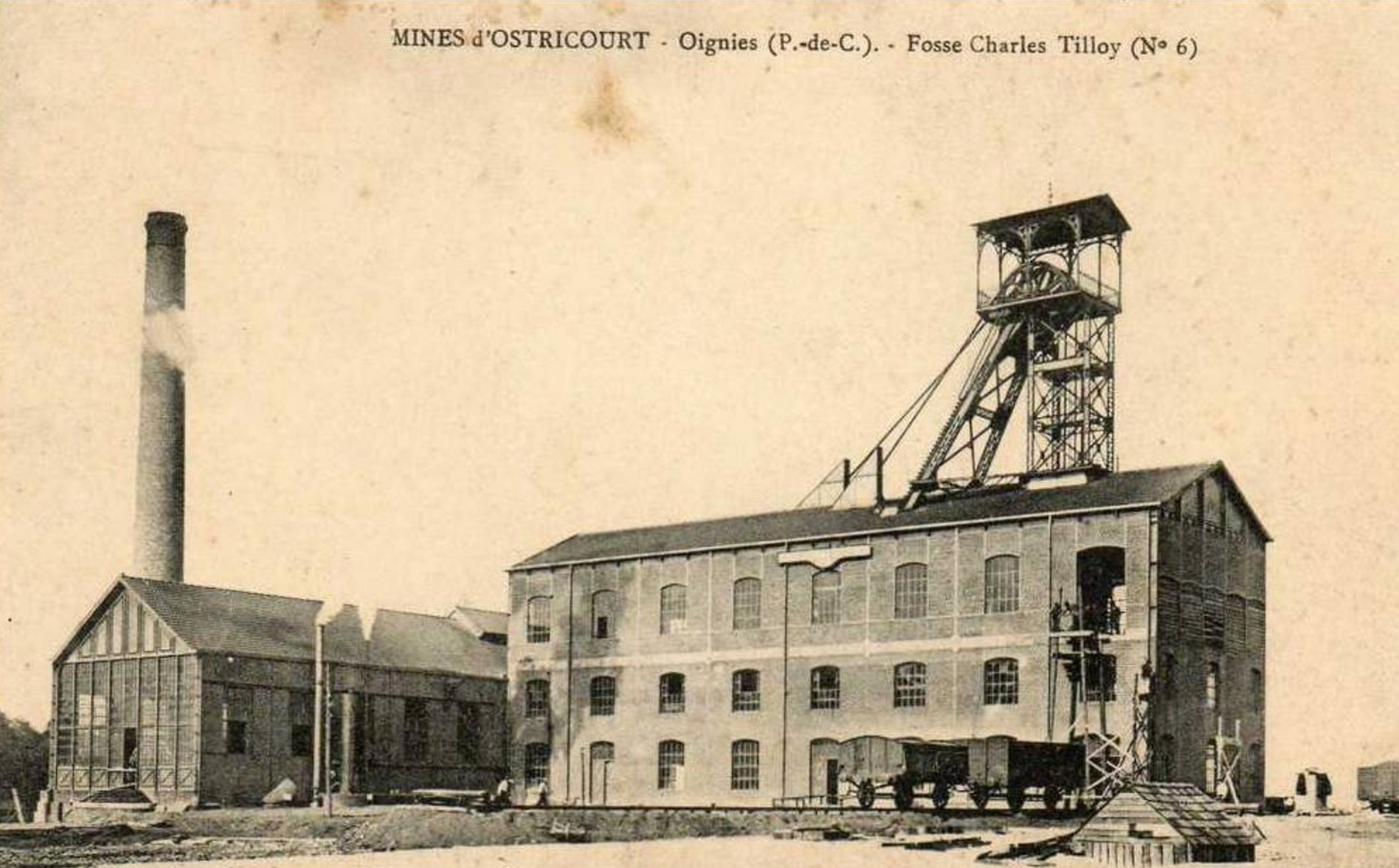 La Fosse n° 6 dite Charles Tilloy de la Compagnie des mines d'Ostricourt était un charbonnage constitué d'un seul puits situé à Ostricourt, Nord, Nord-Pas-de-Calais, France.